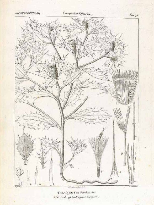 Thevenotia persica - Ilustración original.